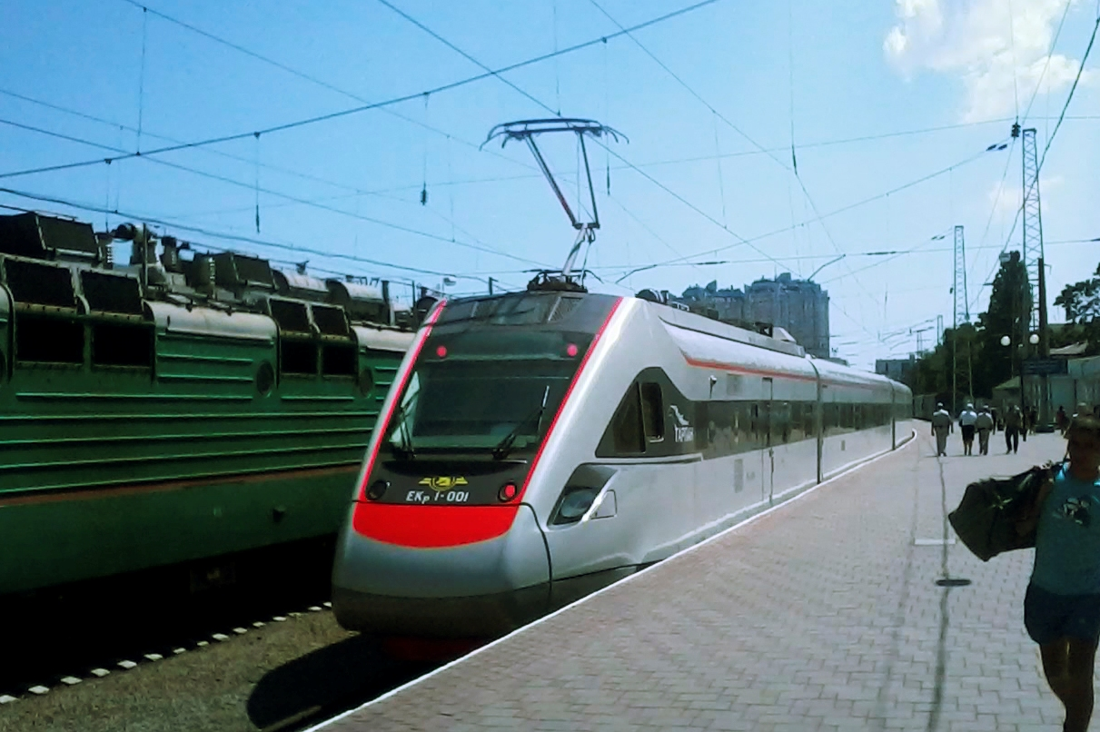 Електропоїзд ЕКр1-001 виробництва КВБЗ на станції Одеса-Головна